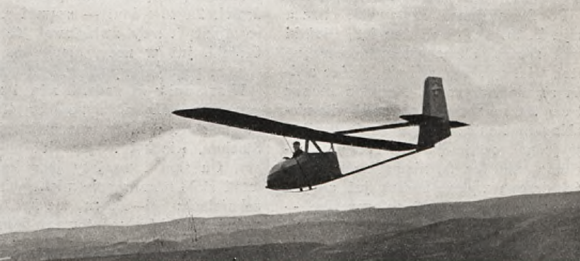 Szybowiec Czajka nad zboczami Bezmiechowej, 1932 r.